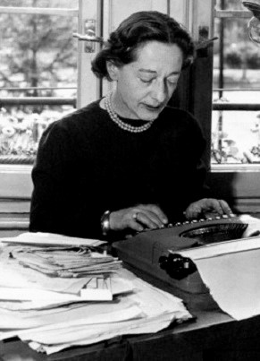 Wanda Bontà